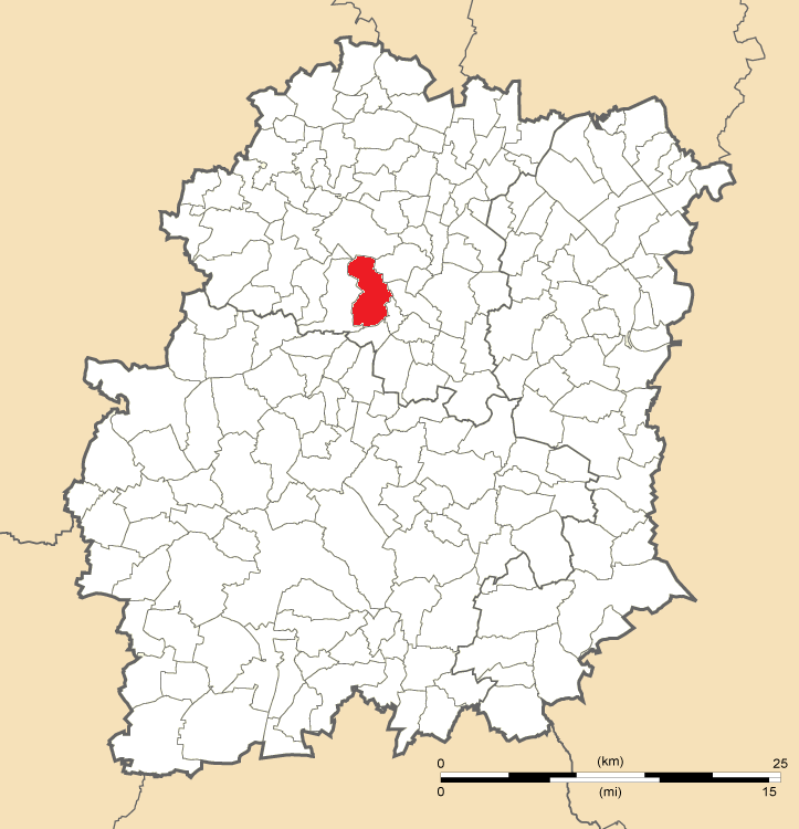 Carte de position d'Ollainville en Essonne (91)